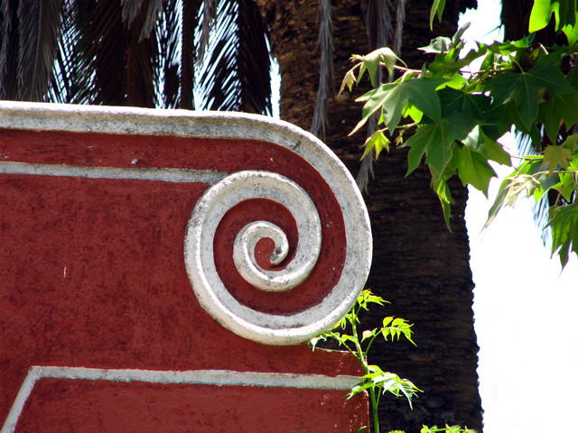 imagem de Vila de Cano